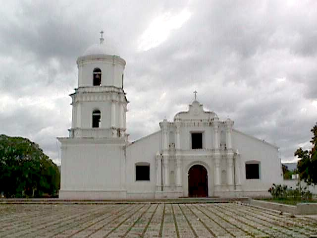 Catedral de El Tocuyo (Templo La Concepcion), estado Lara - Venezuela (1999)